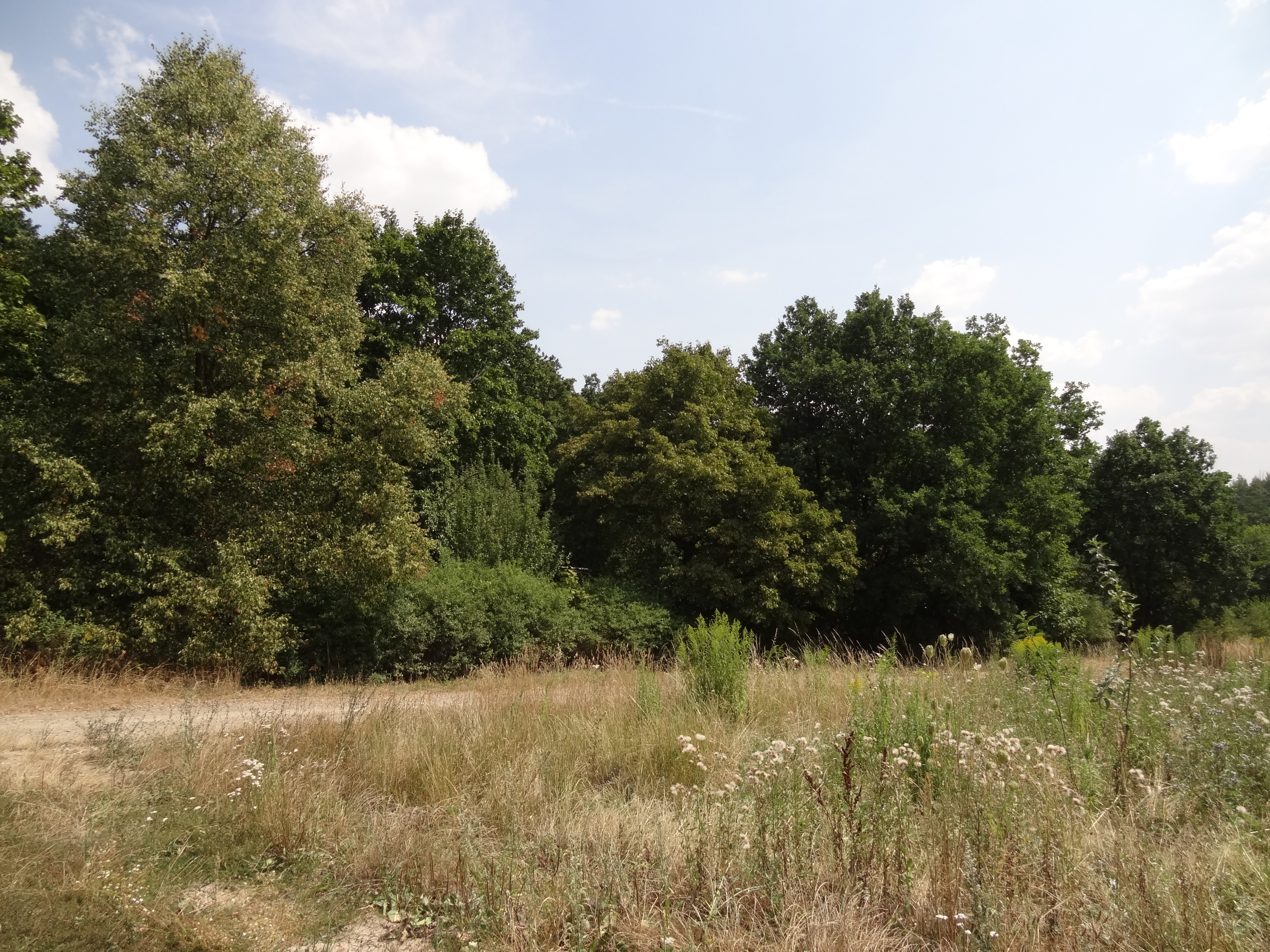 Přírodní park Škvorecká obora-Králičina - lesy východně od sídliště Rohožník a severně od Květnické studánky